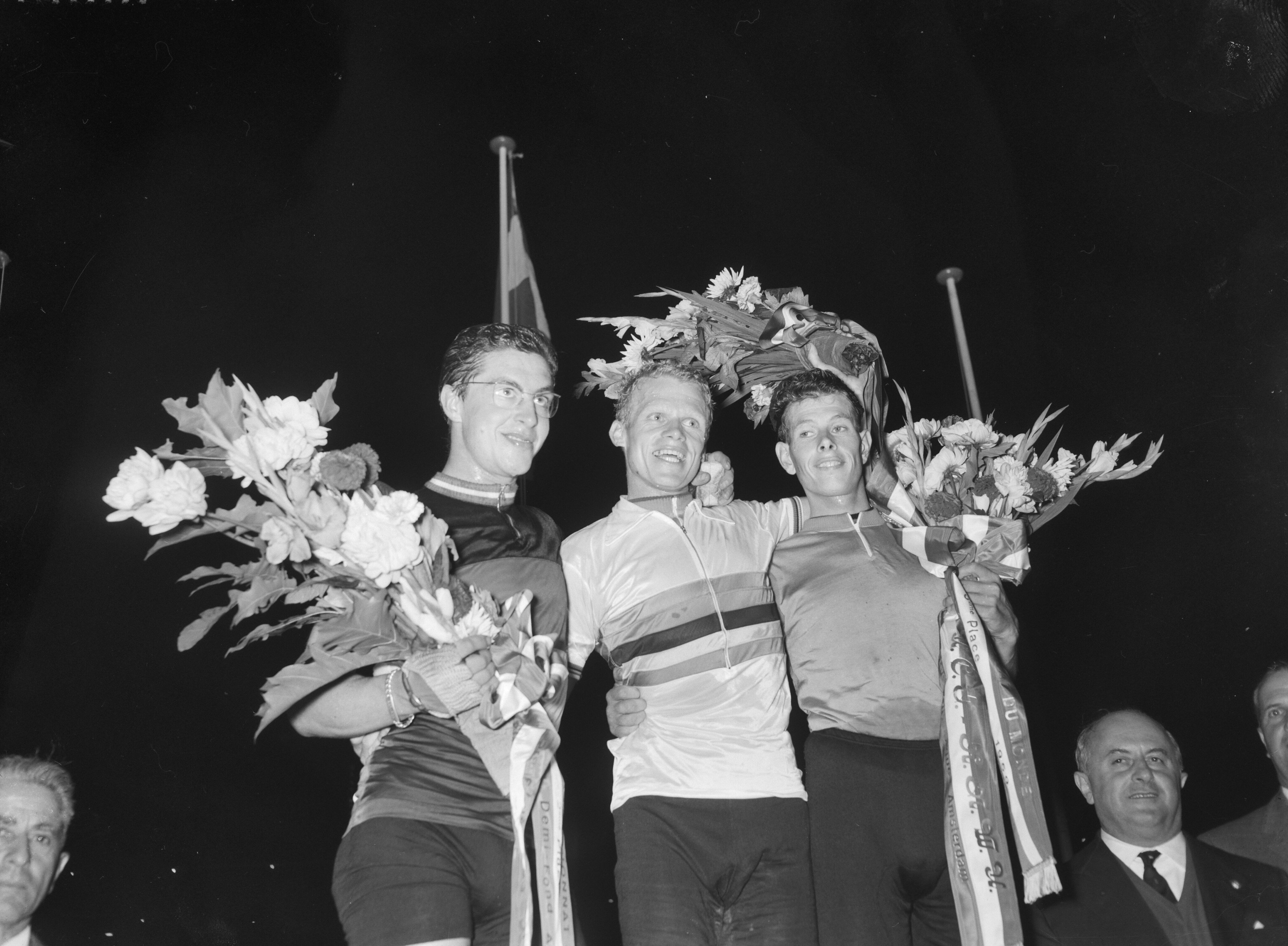 Collectie / Archief : Fotocollectie Anefo Reportage / Serie : [ onbekend ] Beschrijving : Wereldkampioenschap wielrennen op de baan in Amsterdam v.l.n.r. Deconinck (België) , Van Houwelingen en Buis Annotatie : Huldiging Stayers Amateurs. Volgens wikipedia werd de DDR-renner Lothar Meier derde, en niet Buis (werd 3e in 1960) Datum : 13 augustus 1959 Locatie : Amsterdam, Noord-Holland Trefwoorden : sport, wielrennen Persoonsnaam : Buis, Henk, Deconinck, Bernard, Houwelingen, Arie van Fotograaf : Rossem, Wim van / Anefo Auteursrechthebbende : Nationaal Archief Materiaalsoort : Negatief (zwart/wit) Nummer archiefinventaris : bekijk toegang 2.24.01.04 Bestanddeelnummer : 910-5883